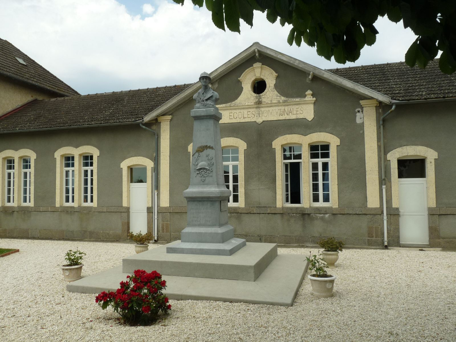 monument aux morts d'Abzac (16), France